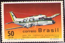 Selo Ano da Indústria Aeronáutica Embraer - Bandeirante, 1969.